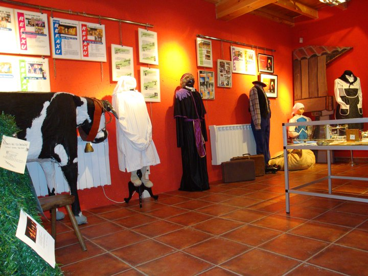 Esposición sobre'l Grupu Teatru Refaxu